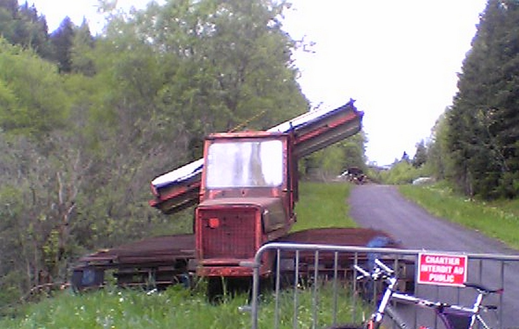 ancienne dameuse de la haute vallée (photo 2007)